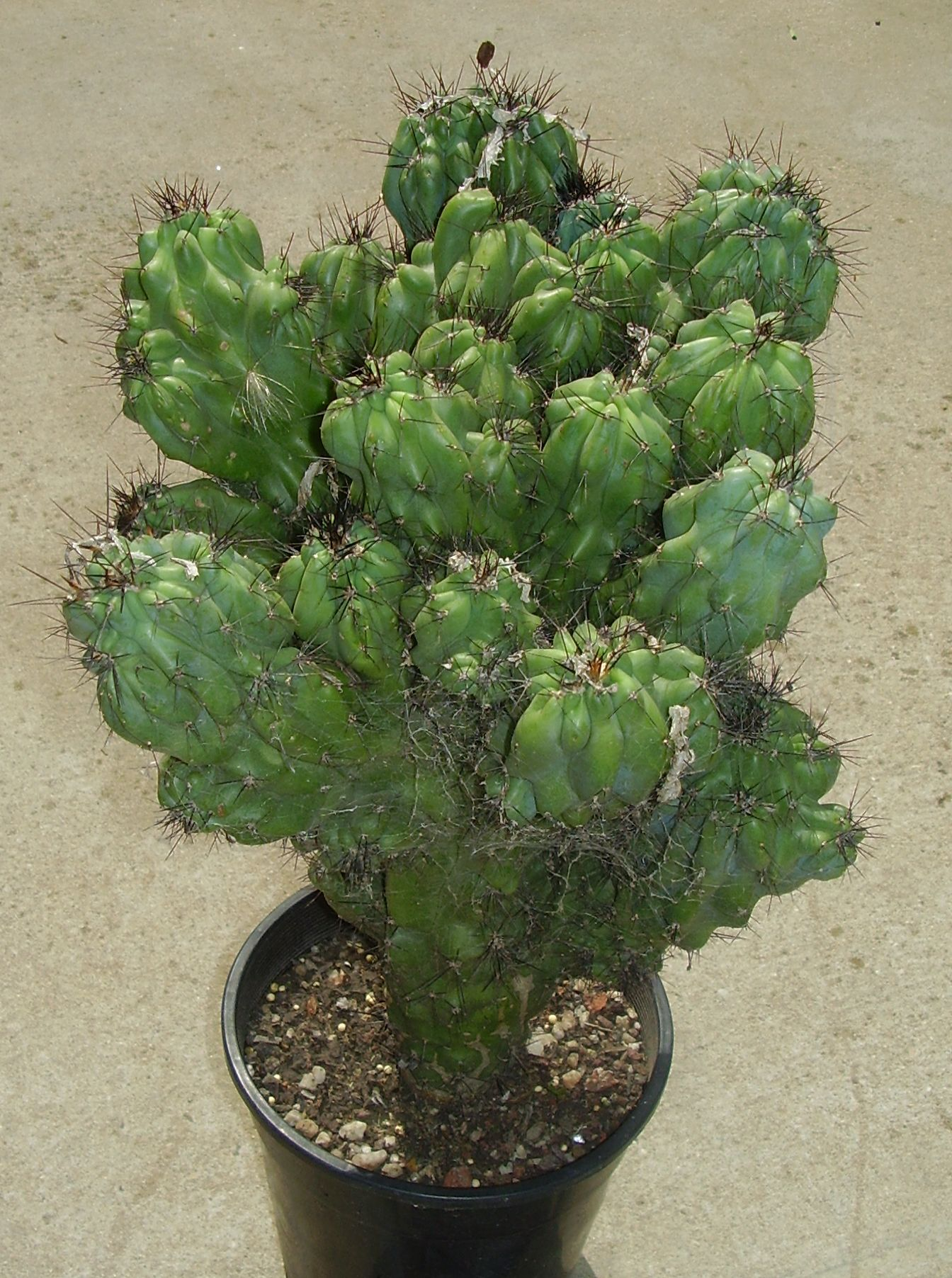 Cereus peruvianus var. monstrosus.